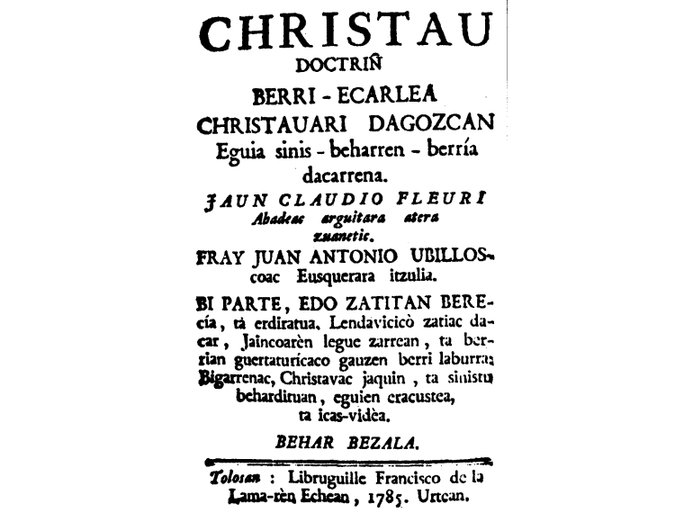 Juan Antonio Ubillosen Kristau Dotrina, 1785ekoa